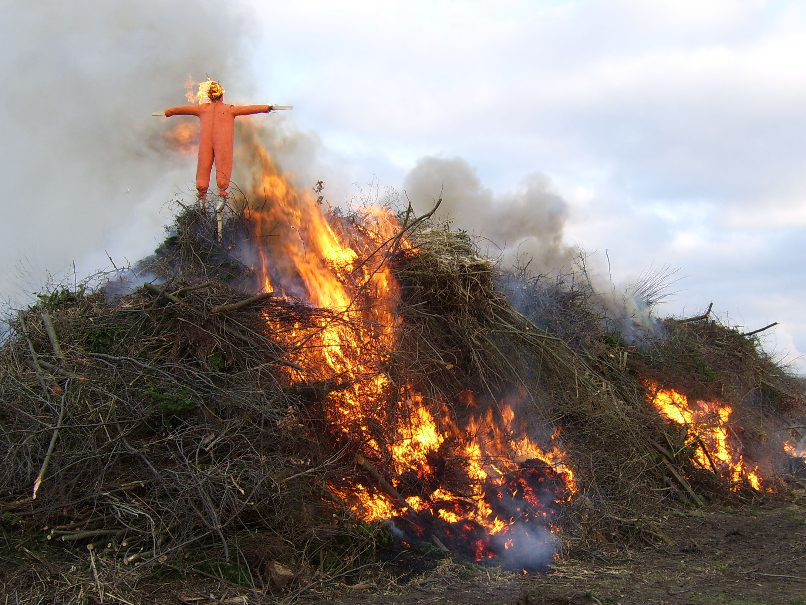 Beim traditionellen Osterfeuer in Seestermühe wird eine Strohpuppe verbrannt.